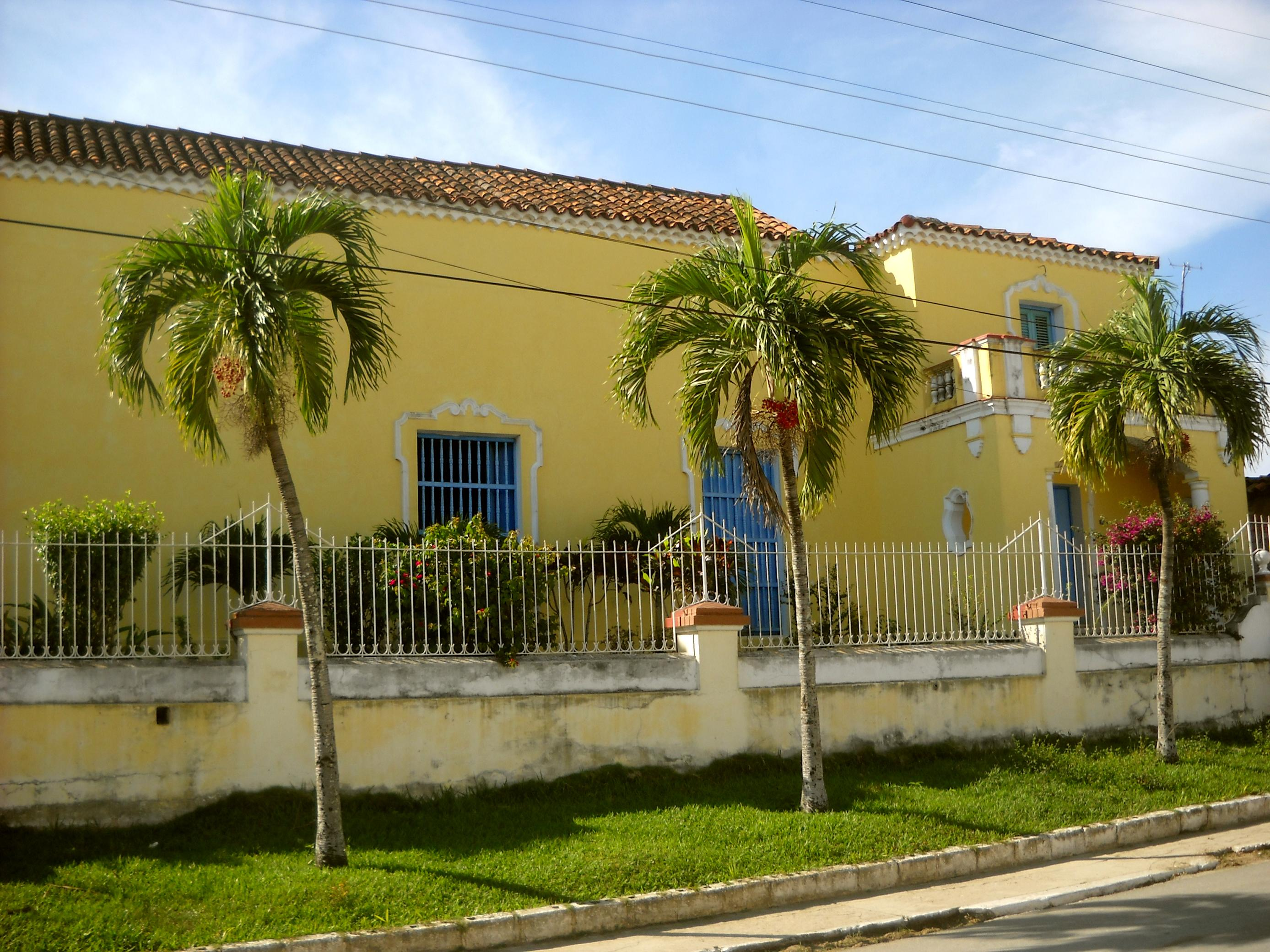 Foto del lateral derecho de la Iglesia de San Joaquí, ubicada en el municipio de San Luis; perteneciente a la occidental provincia de Pinar del Río, Cuba.